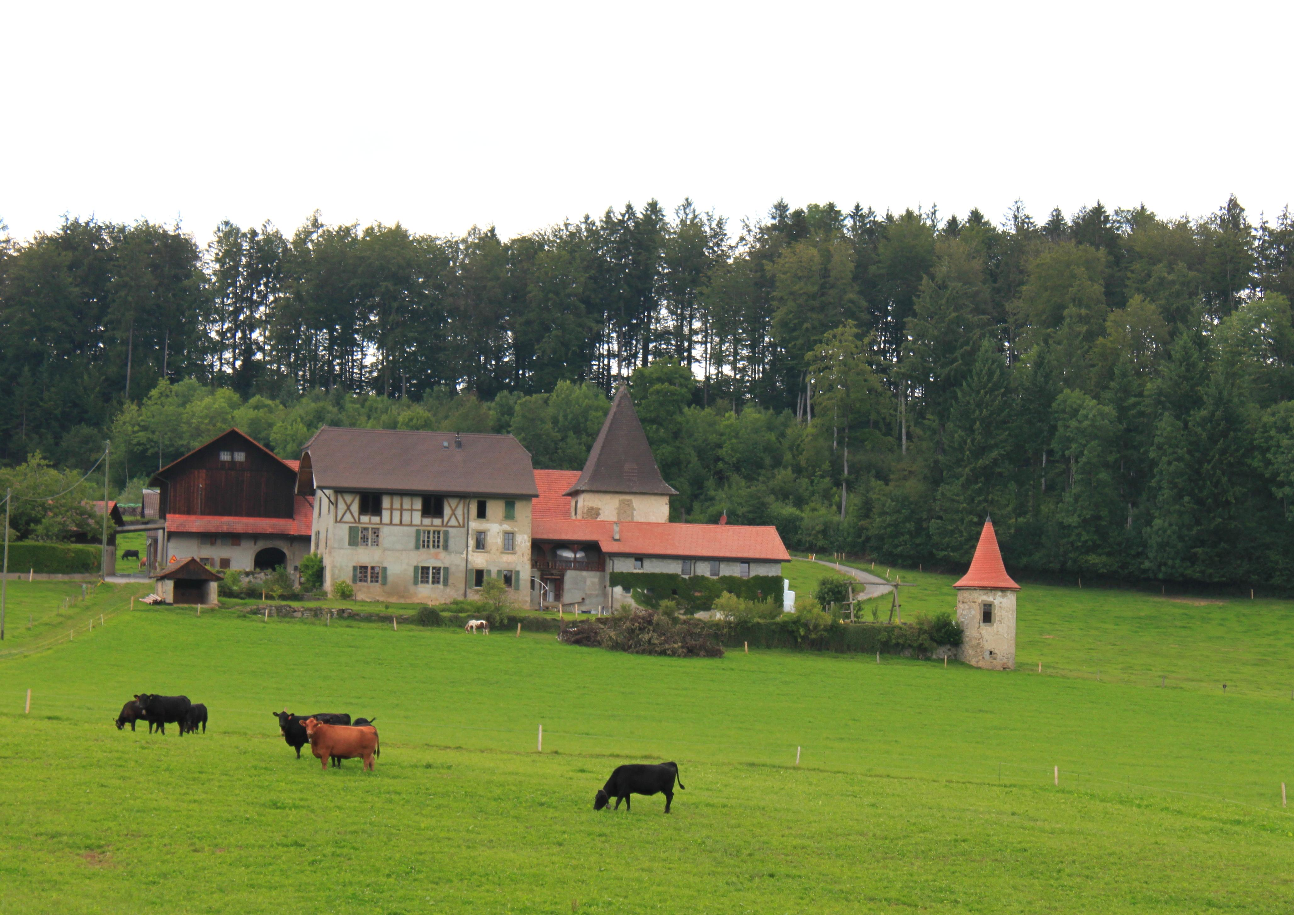 Suisse, canton de Vaud, Les Tavernes, abbaye cistercienne de Haut Crêt: vue du domaine de la Dausaz, connu dès le 12e siècle comme une grange dépendante de l'abbaye de Haut Crêt. Le château à proximité date lui du 16e.